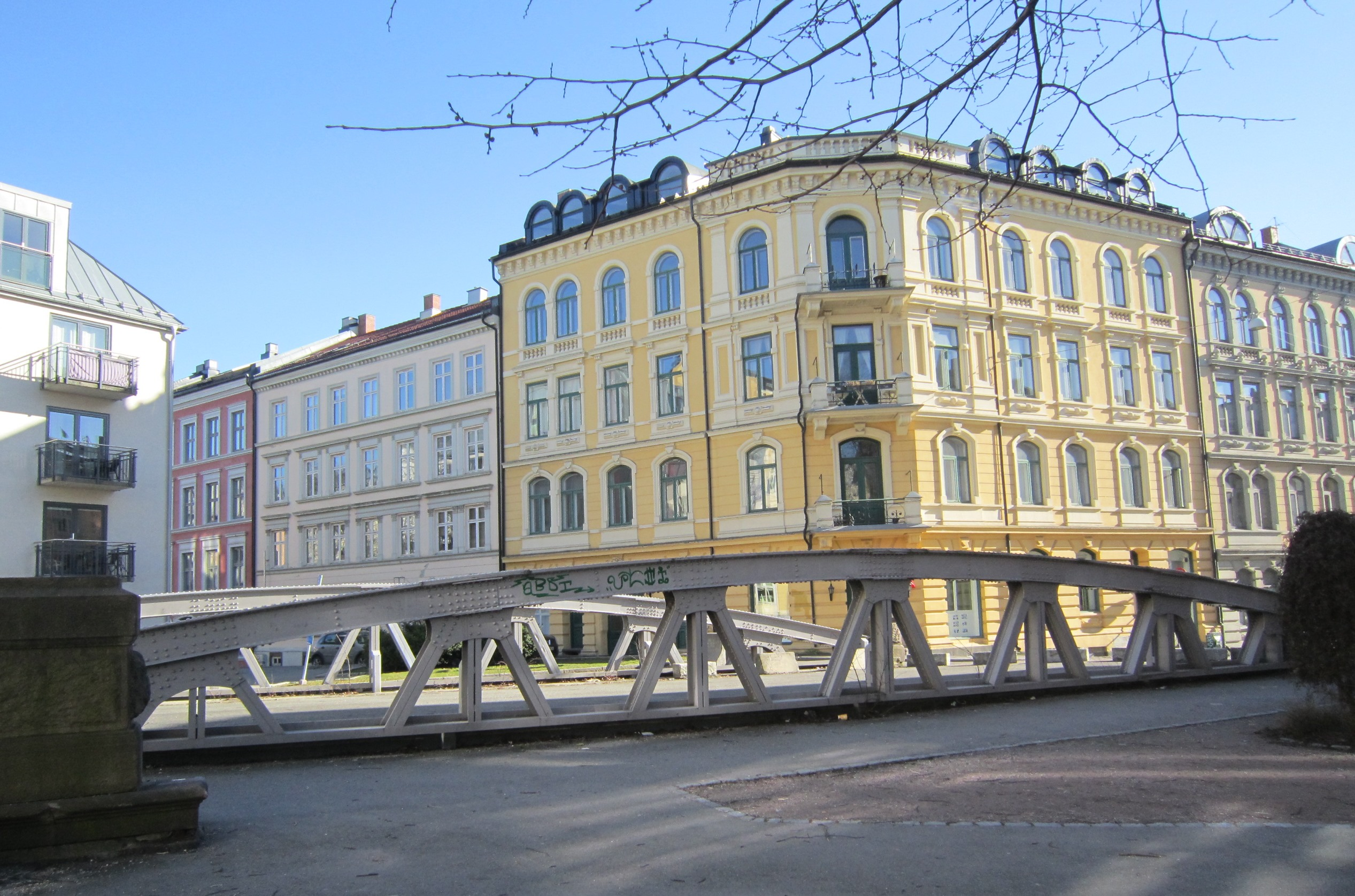 Tidligere bro over jernbanen i nedre del av Huitfeldts gate. Hjørnegården på bildet er Huitfeldts gate 32. Til høyre for den er nr. 34. Til venstre er nr. 36B og deretter Ruseløkkveien 59C. Bygget helt til venstre er Løkkegangen 5.